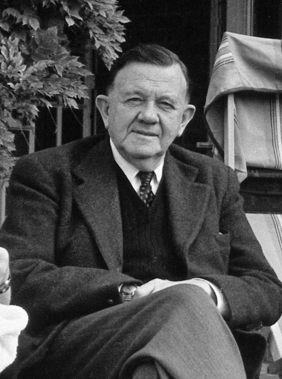 Sir Neil Hamilton Fairley